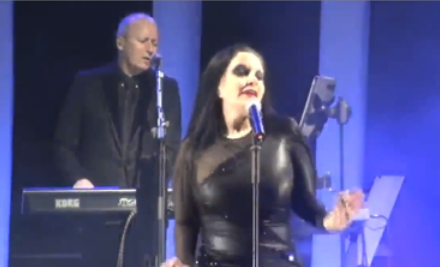 Nacho Canut y Alaska en una actuación. 2013.